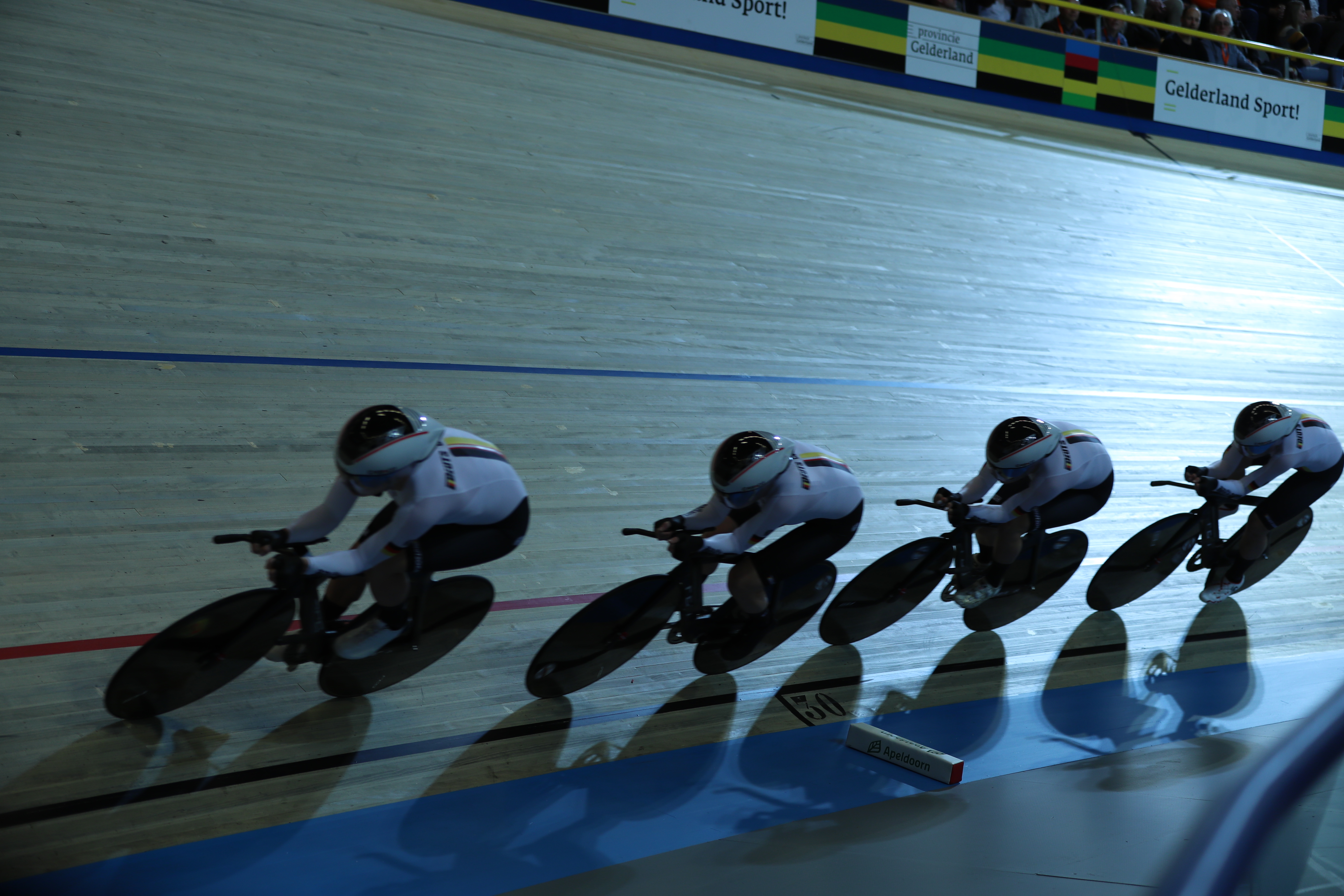 Deutscher Bahn-Vierer der Männer